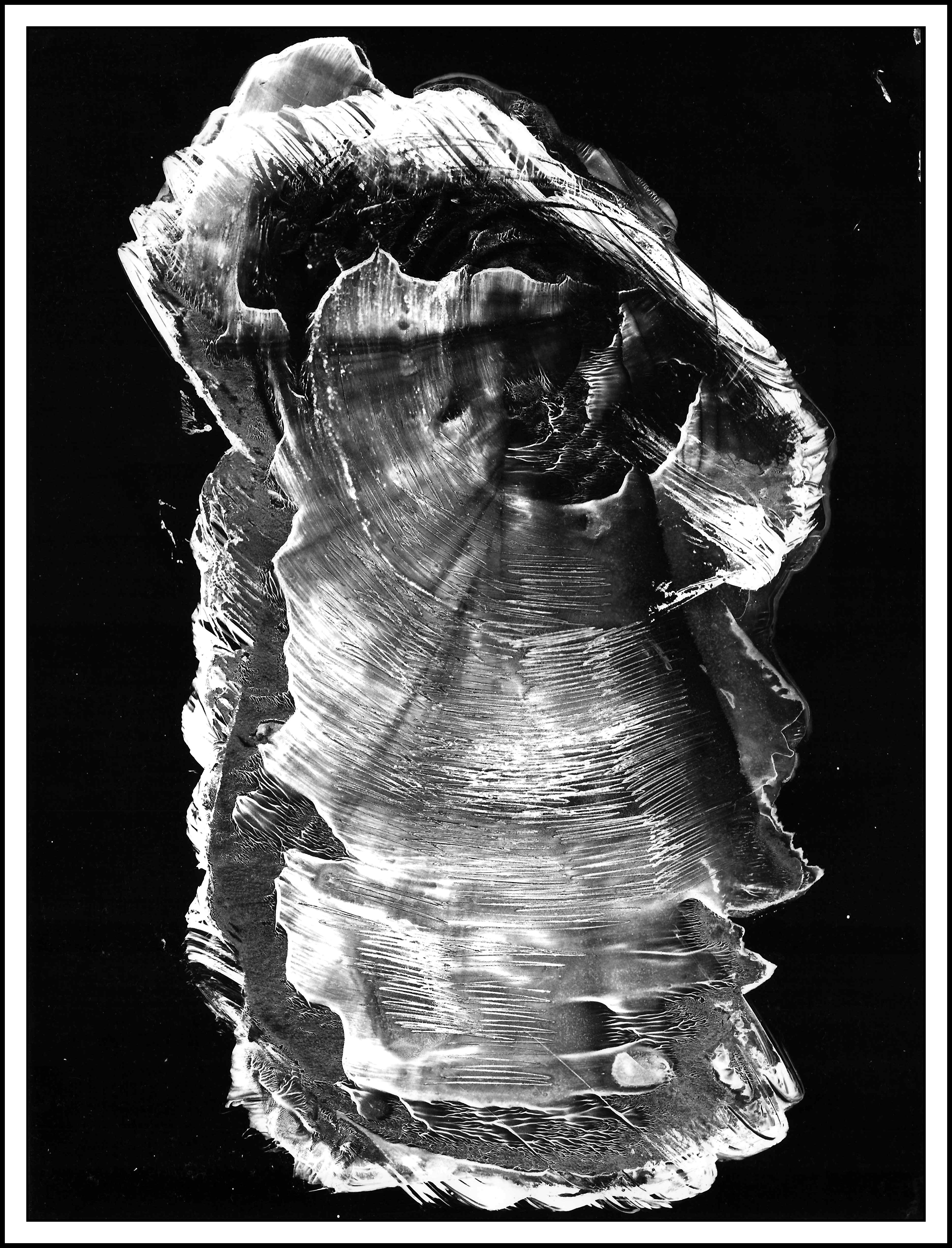 Fotografik *1966 30 cm x 40 cm